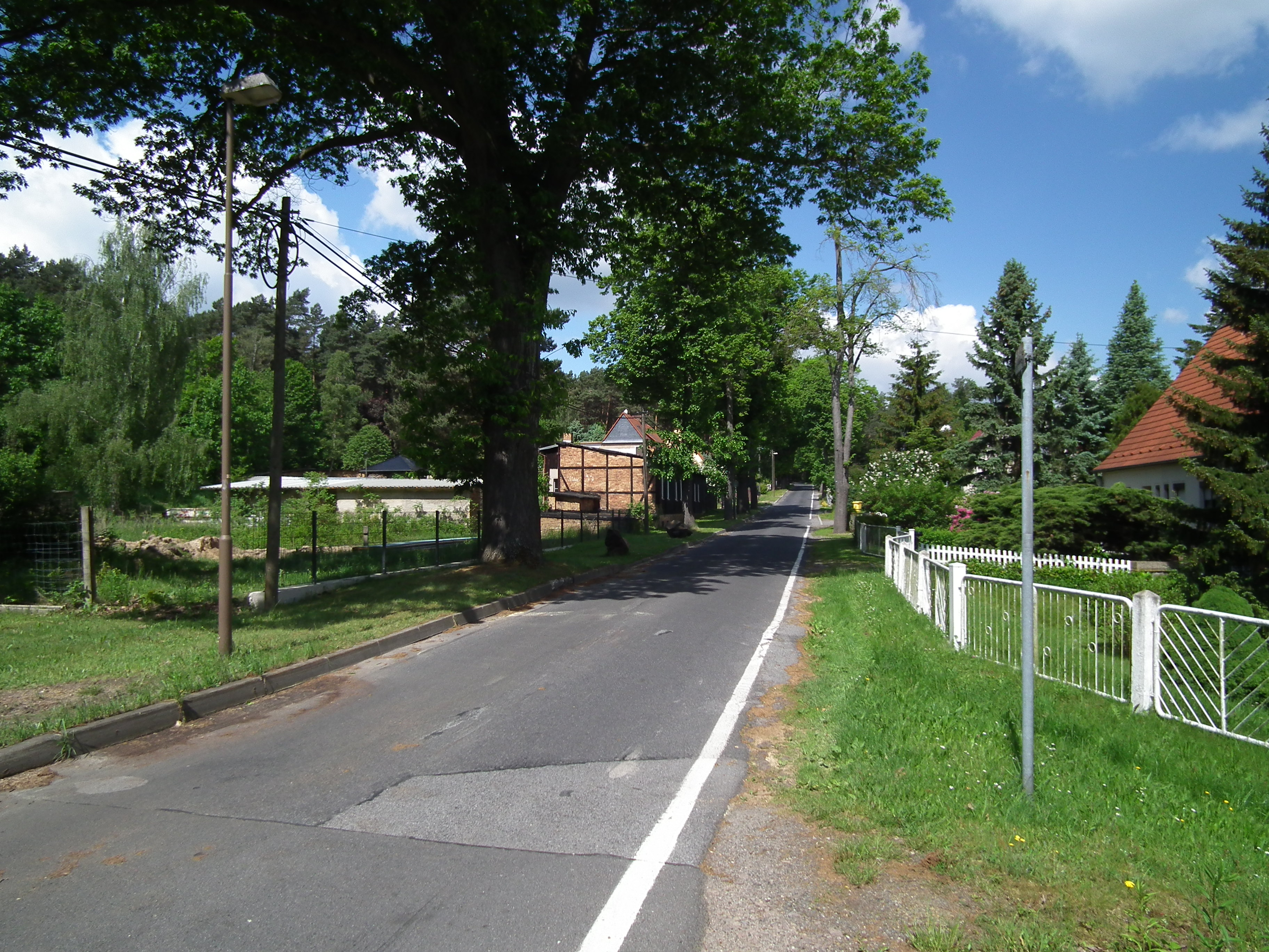 Zeißholz Hornjoserbsce: W Ćisowje